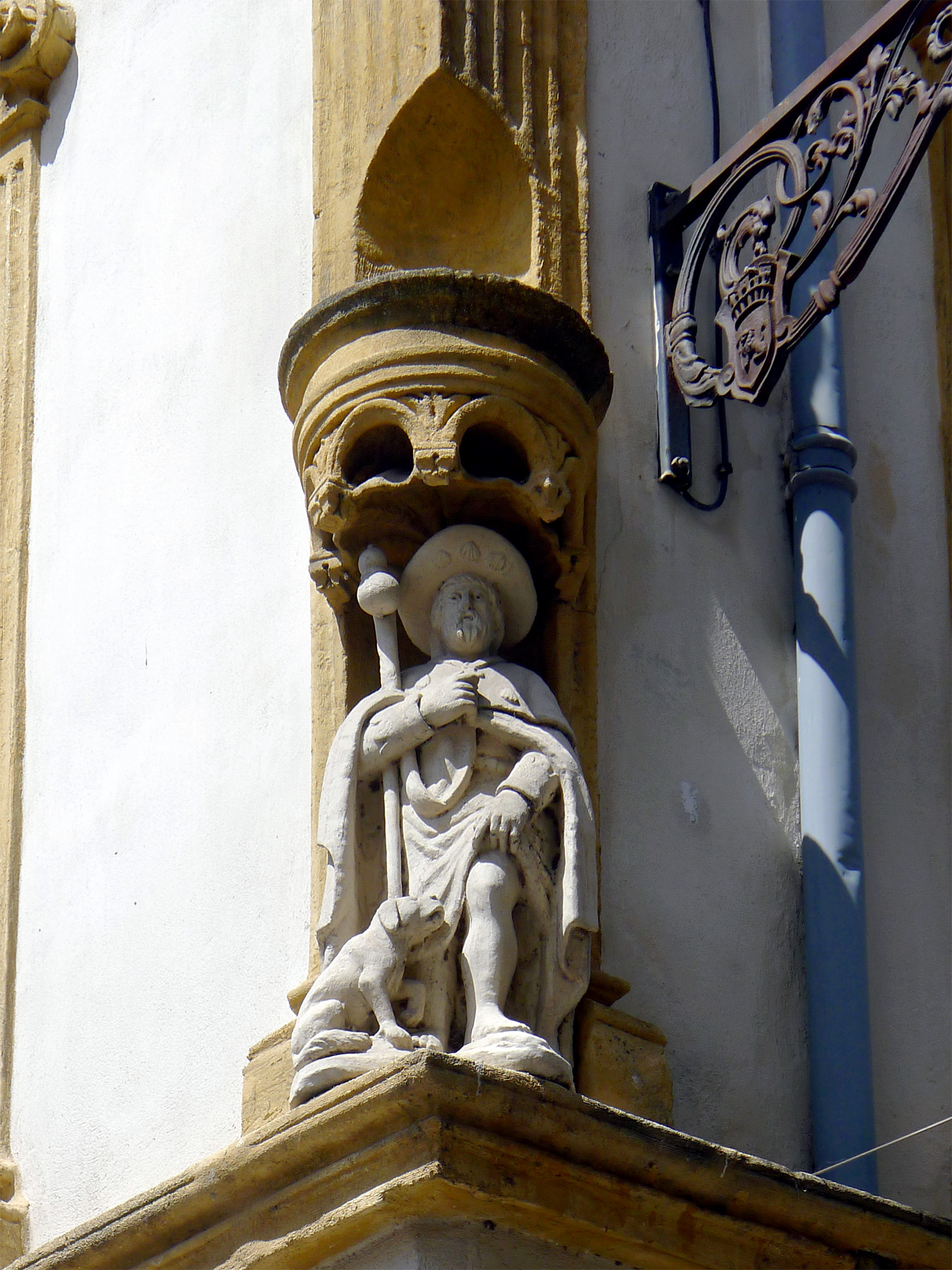 Maison Alphonse Benoît (Inscrit) - n°14 rue du Quatre Septembre (sculpture de Saint-Roch) - Arles